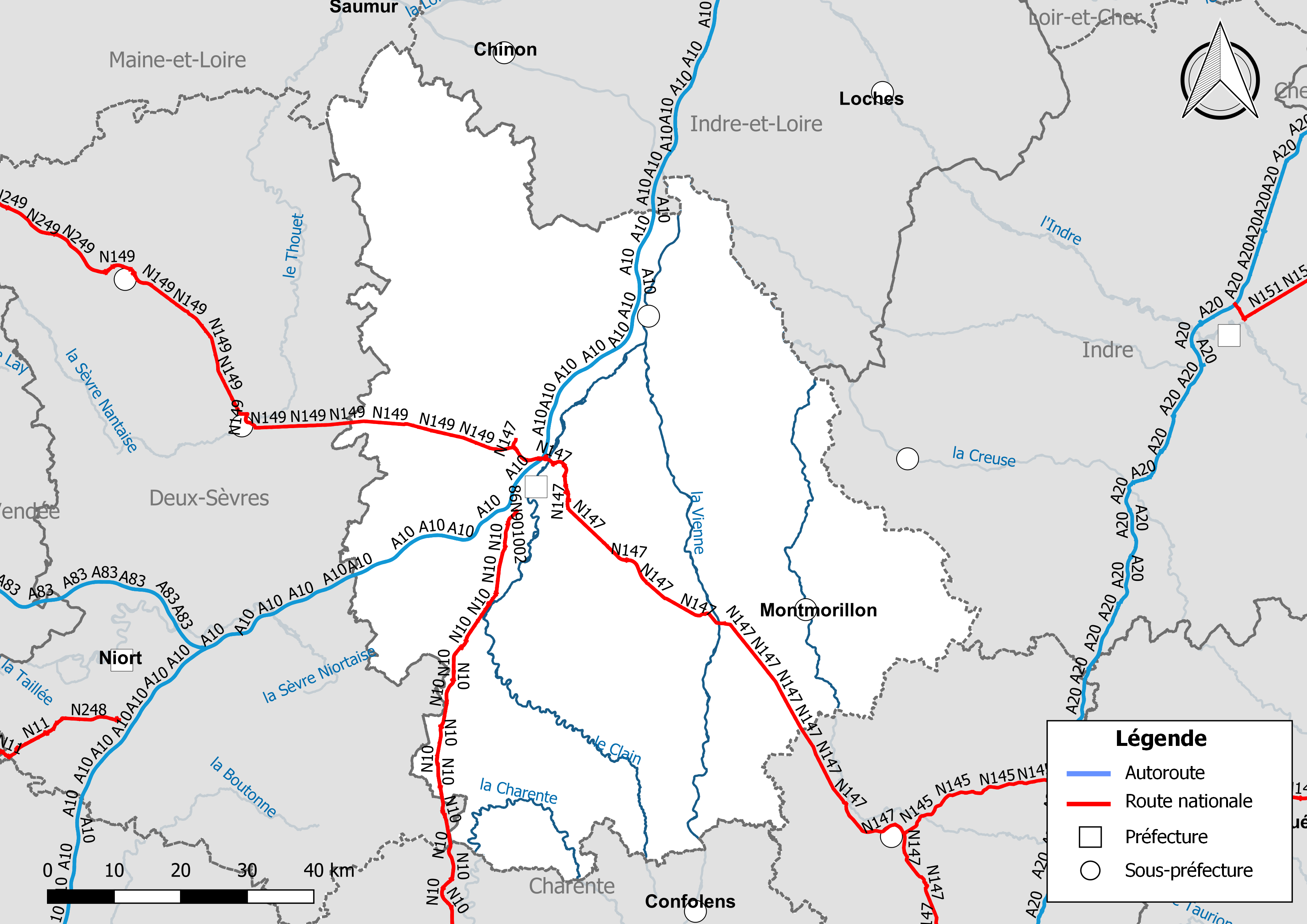 Carte du réseau routier national, constitué des autoroutes et des routes nationales, dans le département de la Vienne (France). Situation au 1er janvier 2019.